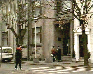 МШ "Коста Манојловић" - Земун, аутор Радивој Лазић, лични рад, 15. 2. 1996. године.